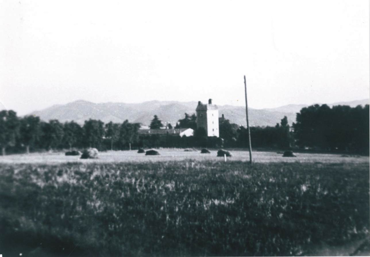 Can Coll durant la dècada dels anys 50